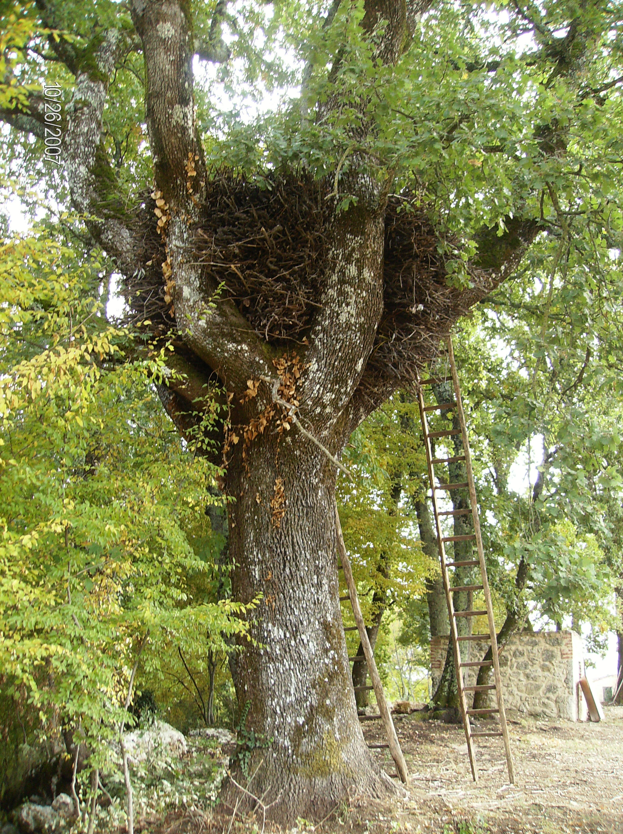 il fascinaro